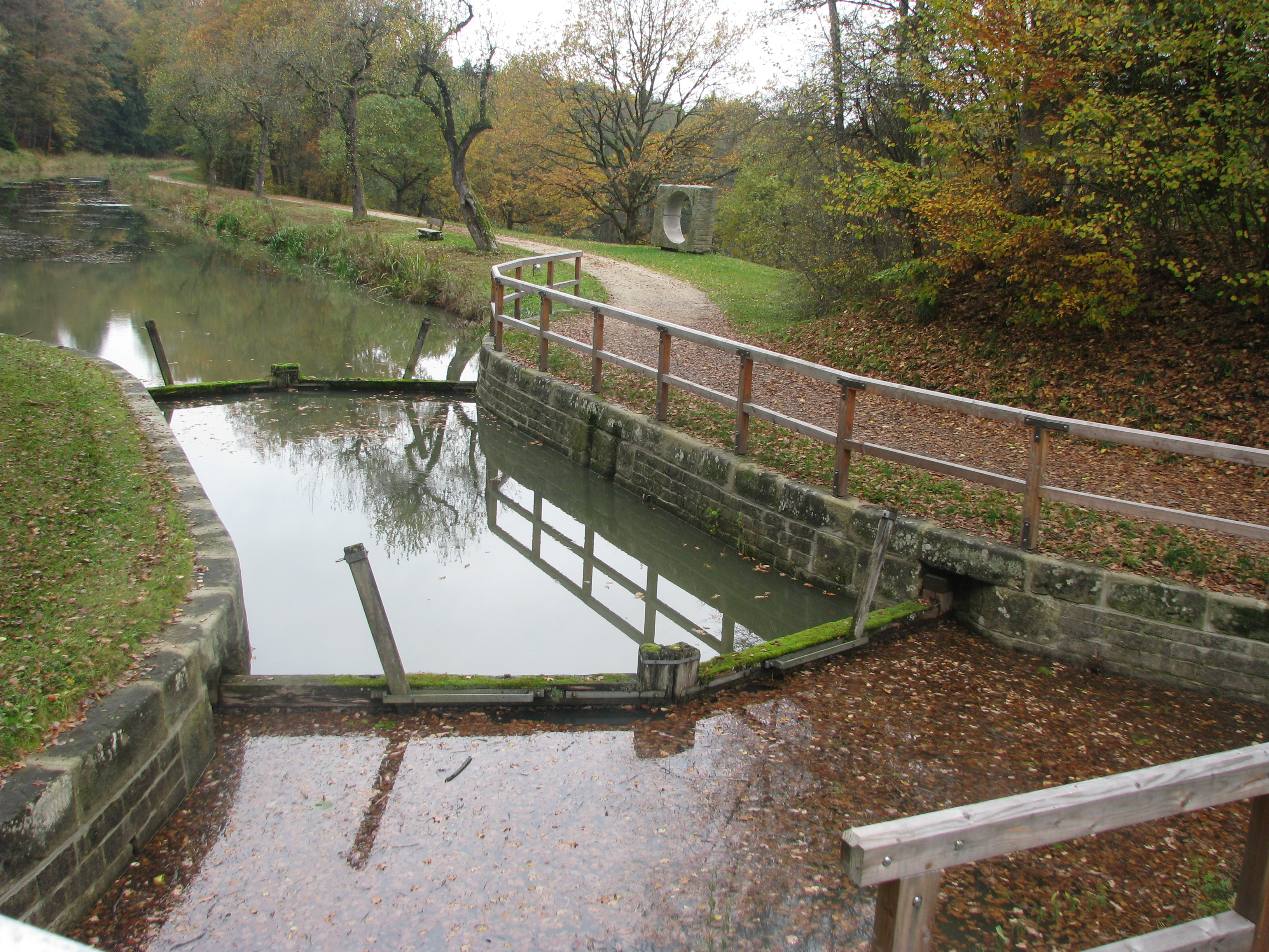 Ludwig-Main-Donau-Kanal bei Unterölsbach, Ortsteil der Gemeinde Berg bei Neumarkt in der Oberpfalz